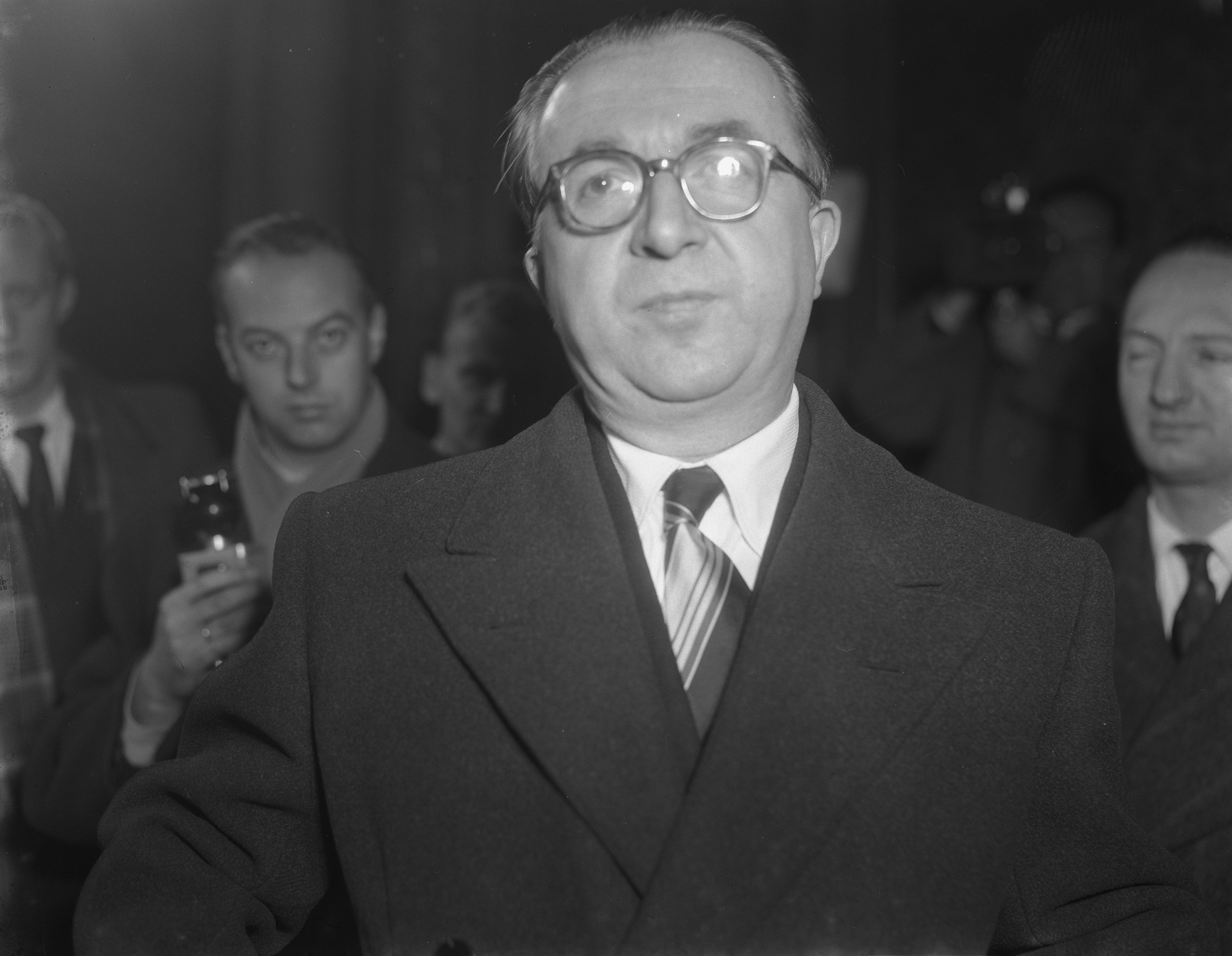 Collectie / Archief : Fotocollectie Anefo Reportage / Serie : [ onbekend ] Beschrijving : Aankomst Italiaanse minister-president, Giuseppe Pella, in Nederland Datum : 24 november 1953 Locatie : Den Haag, Zuid-Holland Trefwoorden : ministers Persoonsnaam : Pella, Giuseppe Fotograaf : Duinen, […] van / Anefo Auteursrechthebbende : Nationaal Archief Materiaalsoort : Negatief (zwart/wit) Nummer archiefinventaris : bekijk toegang 2.24.01.04 Bestanddeelnummer : 906-1286